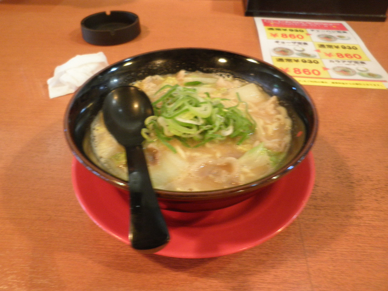 あじがさね